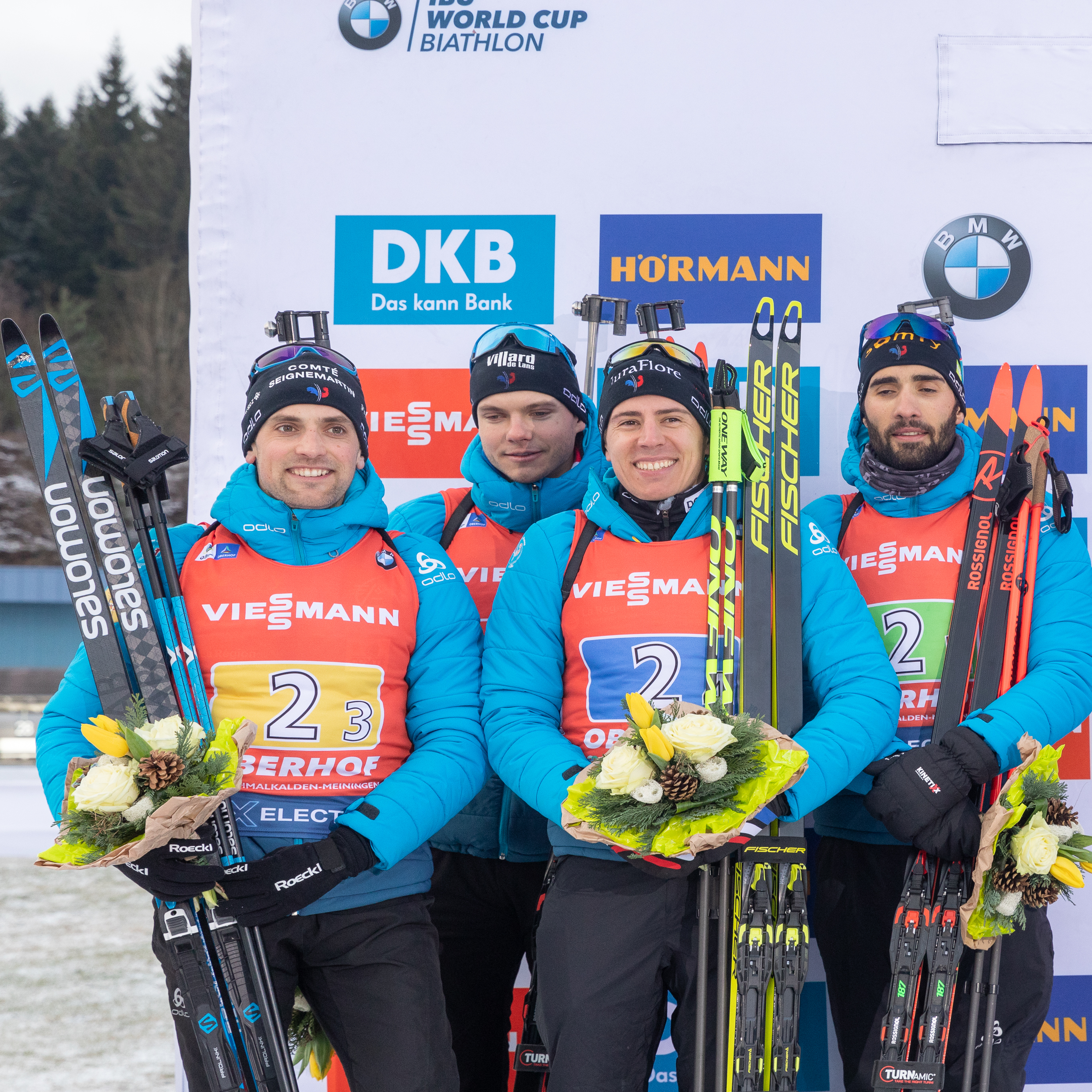 IBU World Cup Biathlon Oberhof; die französische Staffel erringt Platz 2; Flower Ceremony, Blumenzeremonie, Siegerehrung; Zweitplatzierter, Silbermedaille, silver medal; Jubel, celebration